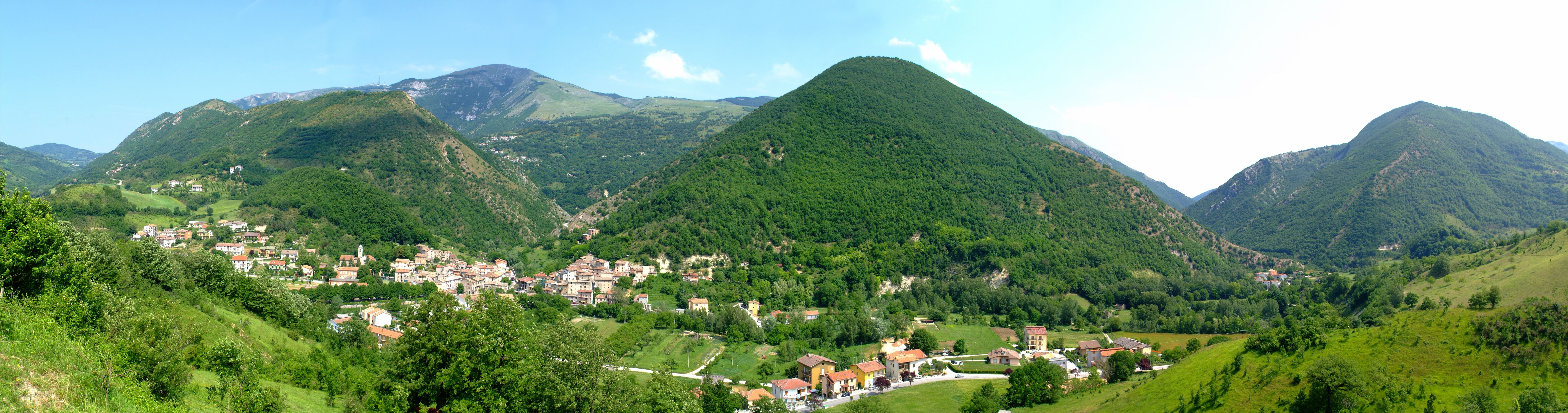 PANORAMA DI PIANELLO DI CAGLI/PESARO/ITALIA